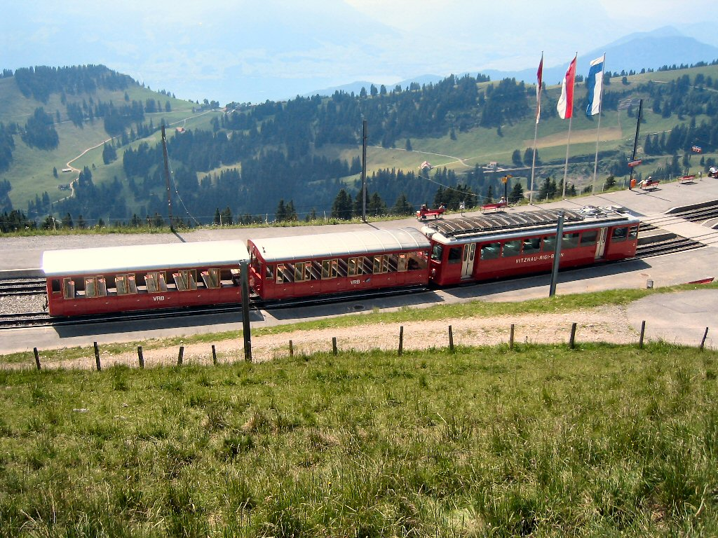 Treintje op de Rigi (BDhe 4/4 5, B 1 & 8) Categorie:Afbeelding trein